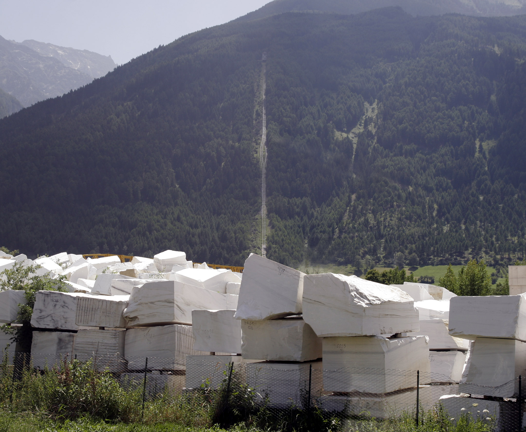 Laaser Mamor (von der Vinschgerbahn aus fotografiert). Im Hintergrund am Berg die Strecke der Mamorbahn.